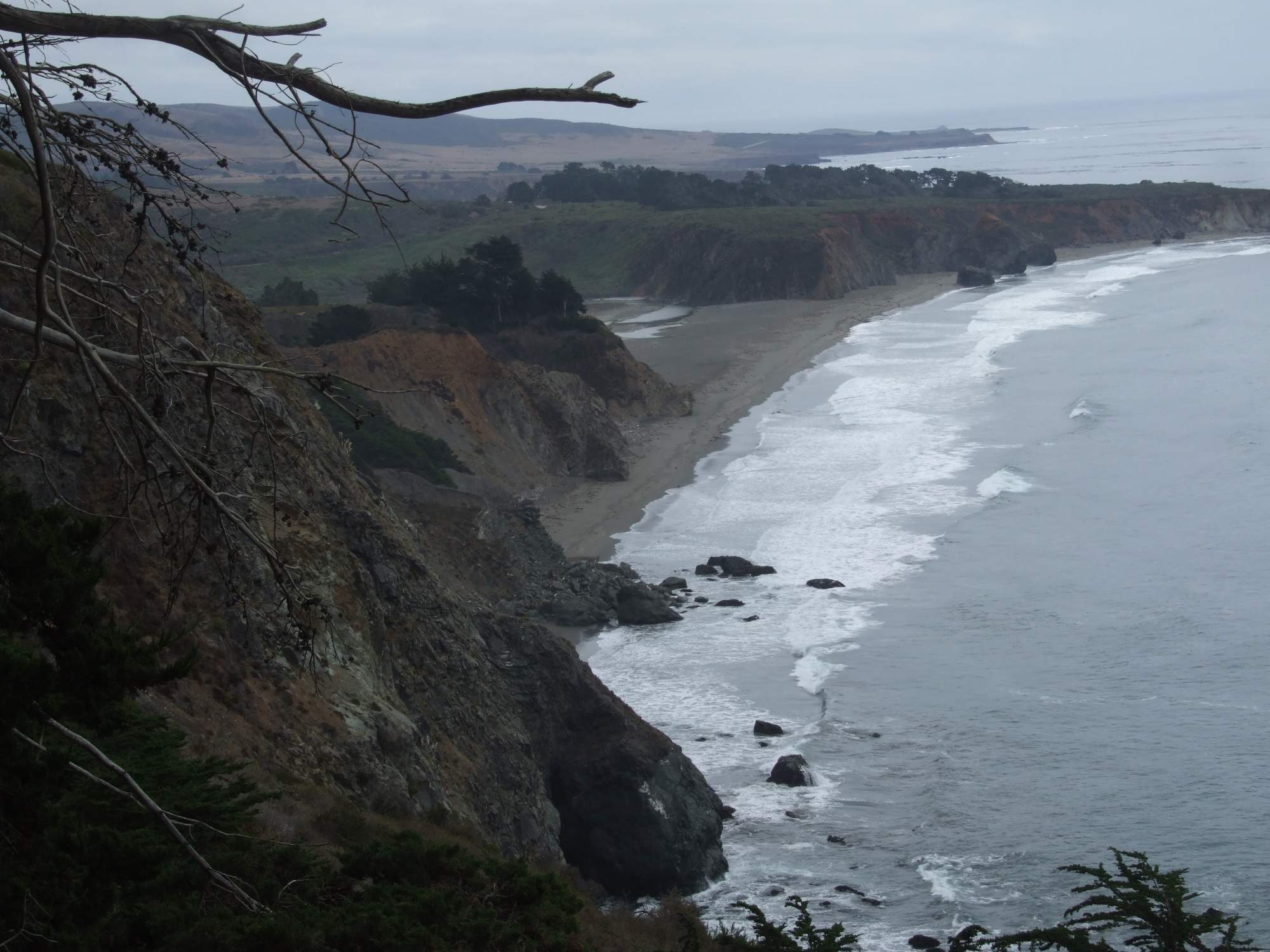 pobřeží u Los Angeles